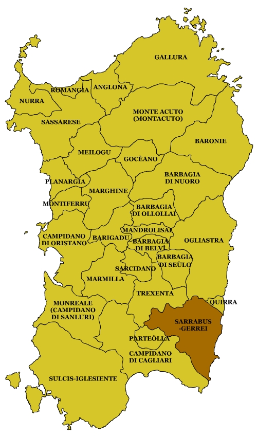 Sardinian Subregions